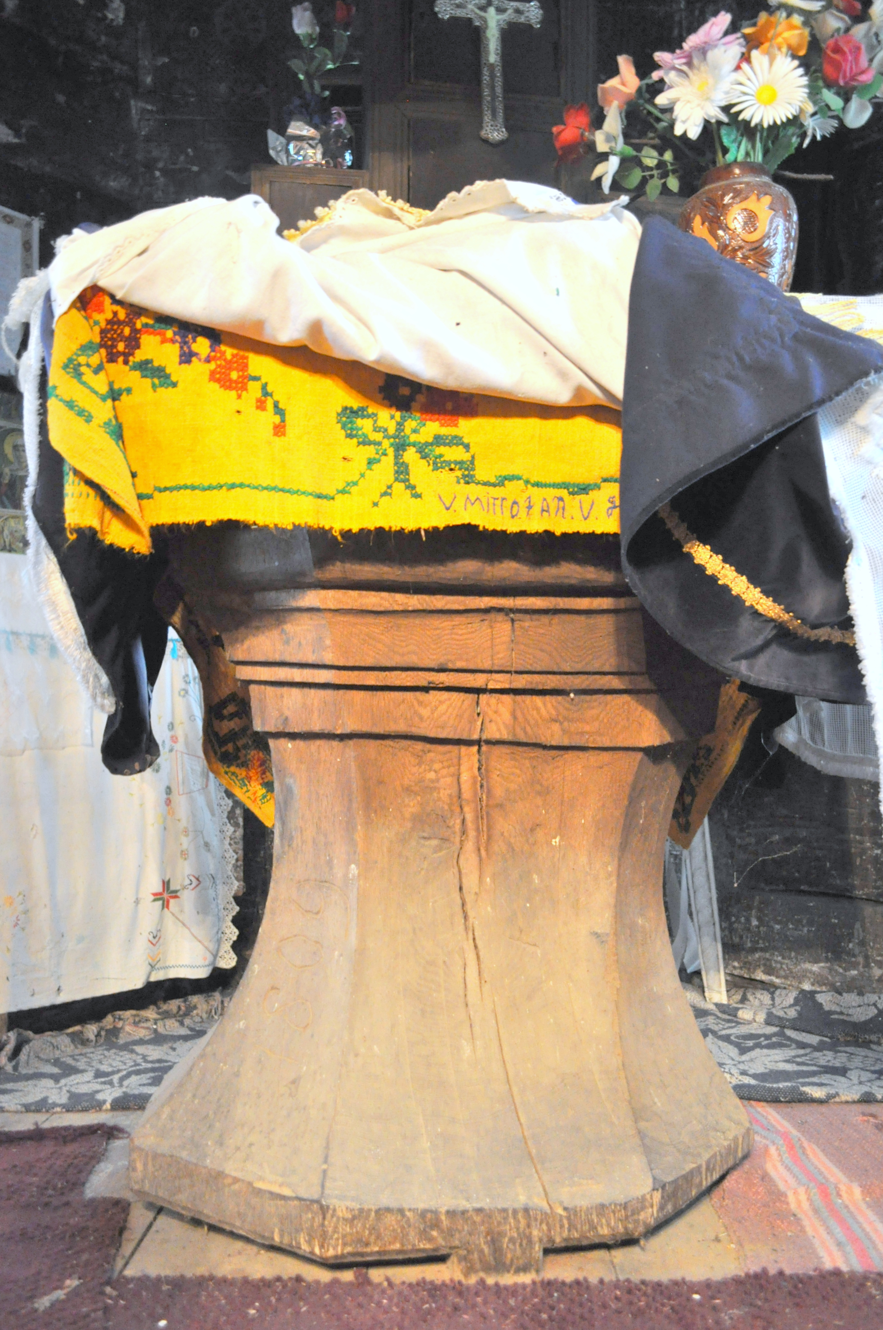 Biserica de lemn din Răstolțu Deșert, comuna Agrij, județul Sălaj